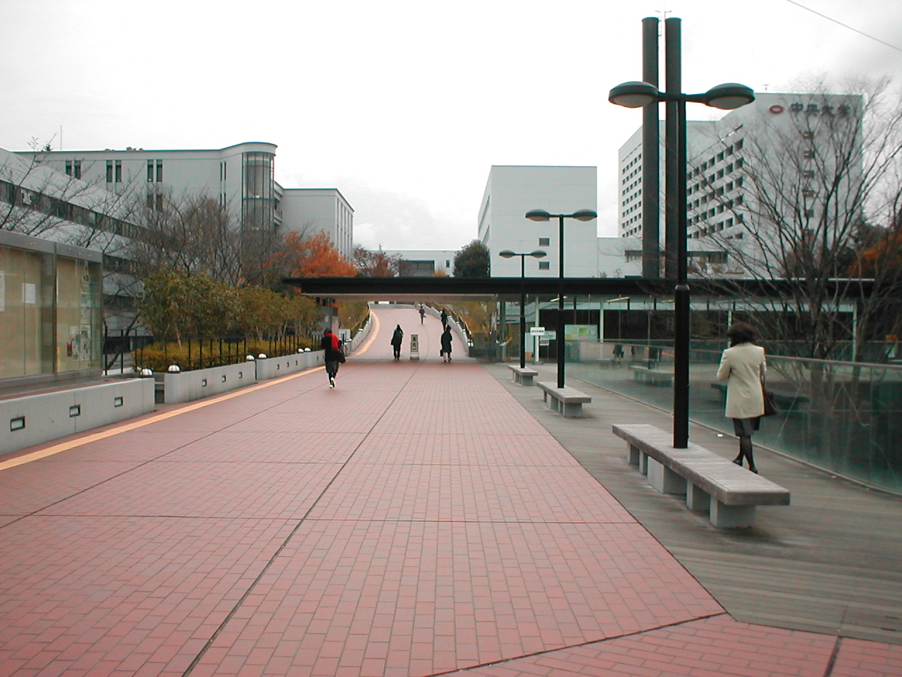 多摩キャンパス東門付近